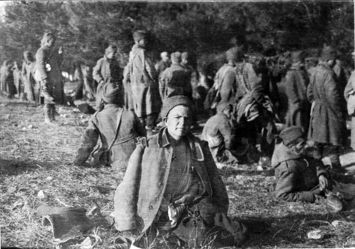 A la recherche de la vermine pour des soldats serbes sur l'île de Vido .